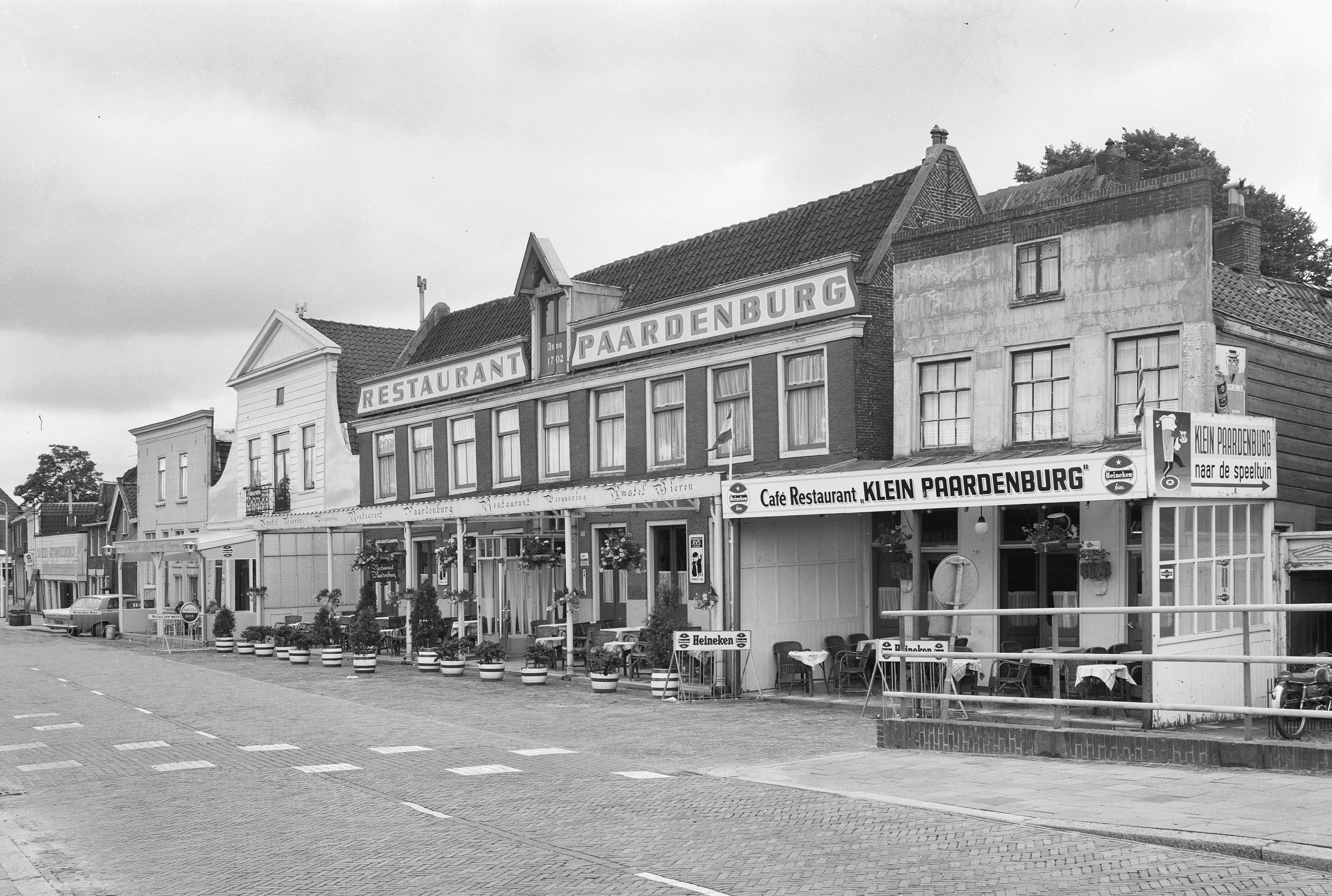 overzicht